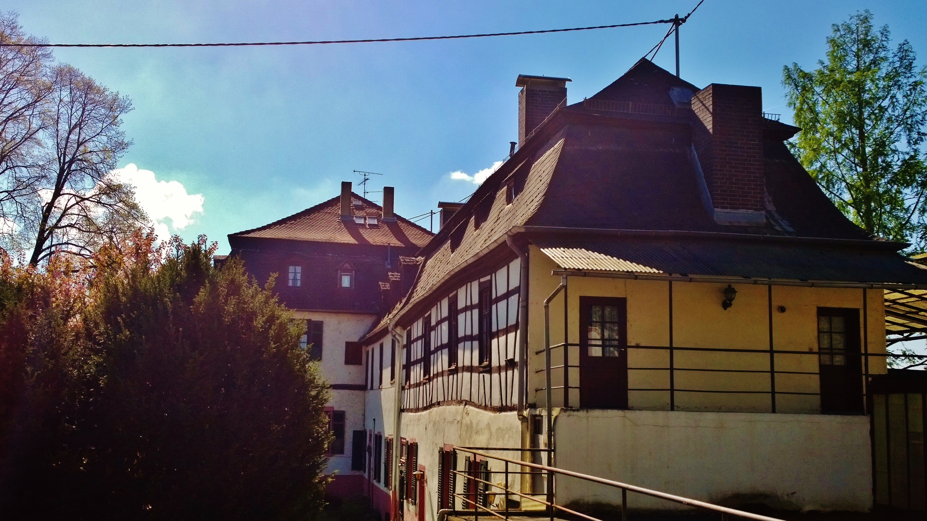 Schloss Günderrode: Blick von Norden auf Nebenhaus mit Fachwerkobergeschoss und Haupthaus